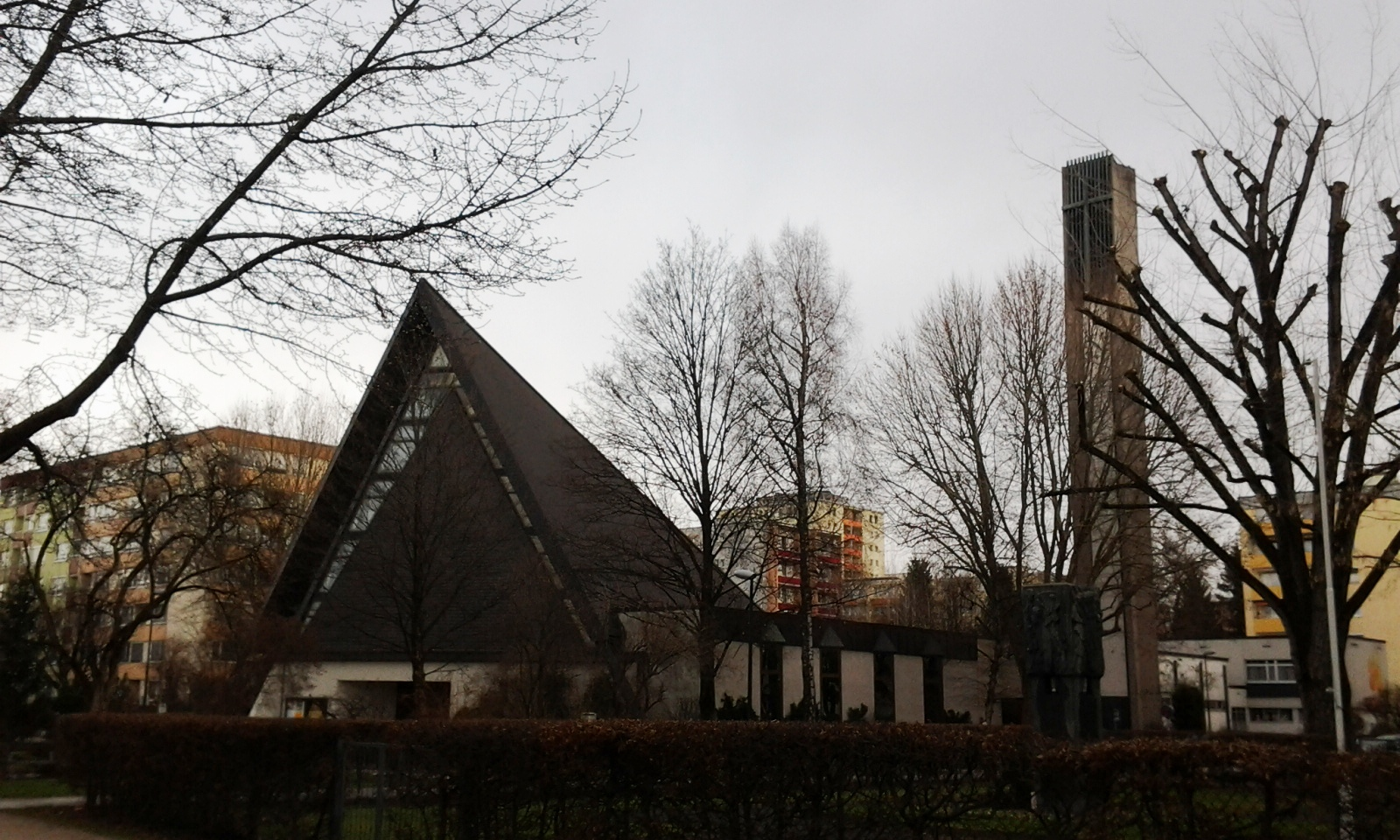 Pfarrkirche Vinzenz Palotti, Salzburg-Lehen